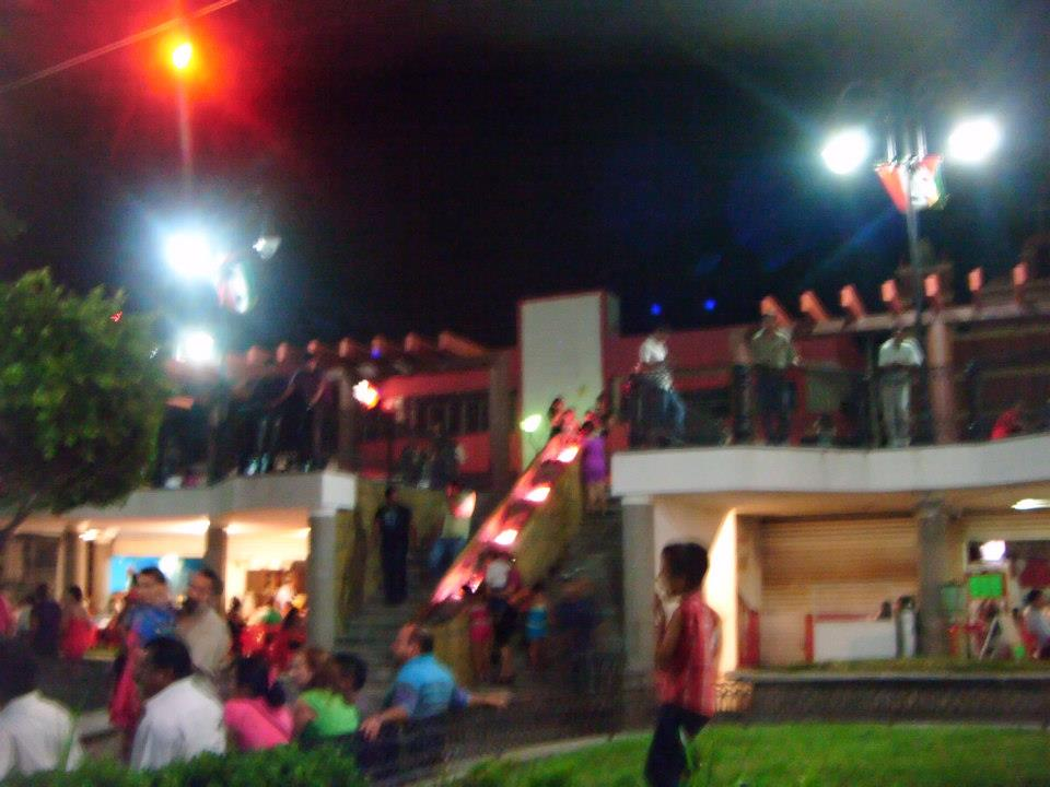 Parte alta del parque central de Villa Corzo, un lugar creado para los jóvenes de la ciudad